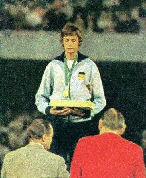 OLYMPIA 1896-1972-PANINI-Figurina ADESIVA !! n.245- BECKER - BRD